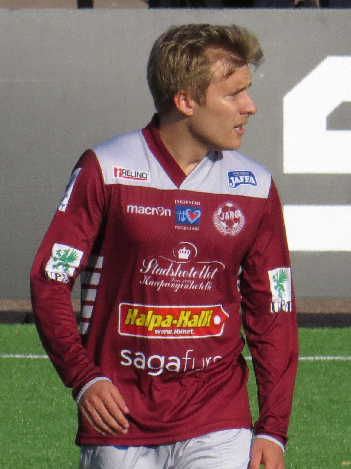 Jani Virtanen, suomalainen jalkapalloilija FF Jaron joukkueessa kaudella 2015.